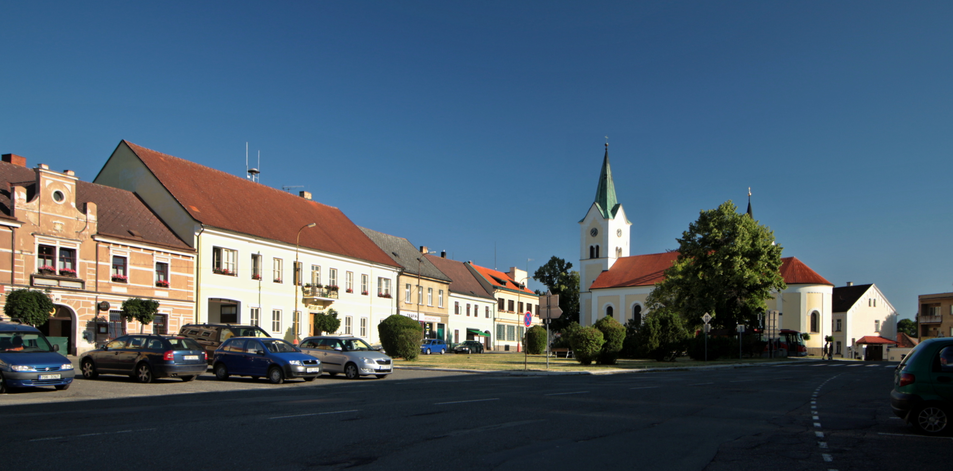 Sedlec-Prčice náměstí 7. května